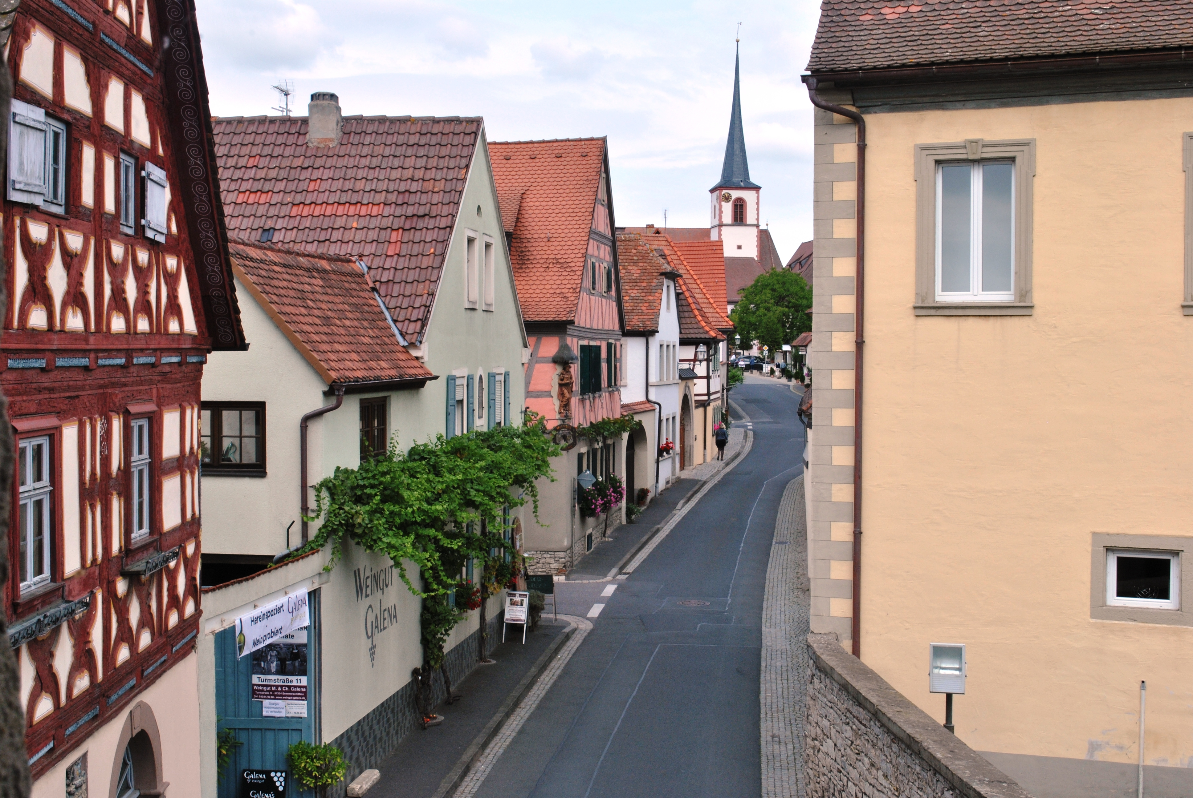 Das befestigte Weinbauerndorf besitzt einen klar gegliederten Grundriss: Innerhalb der im Oval geführten Ortsmauer verläuft die Marktstraße der Längsachse nach; ihre leicht verschobene Lage lässt nur eine einseitige Abzweigung von Nebengassen zu, die sich durch rechtwinklige Führung auszeichnen. Die Umbauung der Pfarrkirche und ihre Abriegelung gegen den Markt hin lässt auf eine ursprüngliche Eigenbefestigung des Kirchenbezirks schließen. Die Marktstraße erweitert sich vom Schwarzacher Tor stetig nach Westen und bildet vor dem Rathaus einen breiten Platz. Stattliche Weinbauernhöfe des Barock umschließen die Platzstraße; auf der Nordseite wenden sie dem Straßenraum jeweils die Giebelseite ihres Wohngebäudes und ein breites Hofportal zu, während auf der Südseite die Traufstellung der Wohnhäuser eine geschlossene Front ergibt. In den Nebengassen besteht die Bebauung aus Häckerhöfen und Kleinhäusern, meist aus dem 18. und 19. Jahrhundert, durchmischt mit einigen stattlichen Barockbauten. Unter den Nebengassen besitzt die auf das Maintor zulaufende Maintorstraße übergeordnete Bedeutung.This is a photograph of an architectural monument.